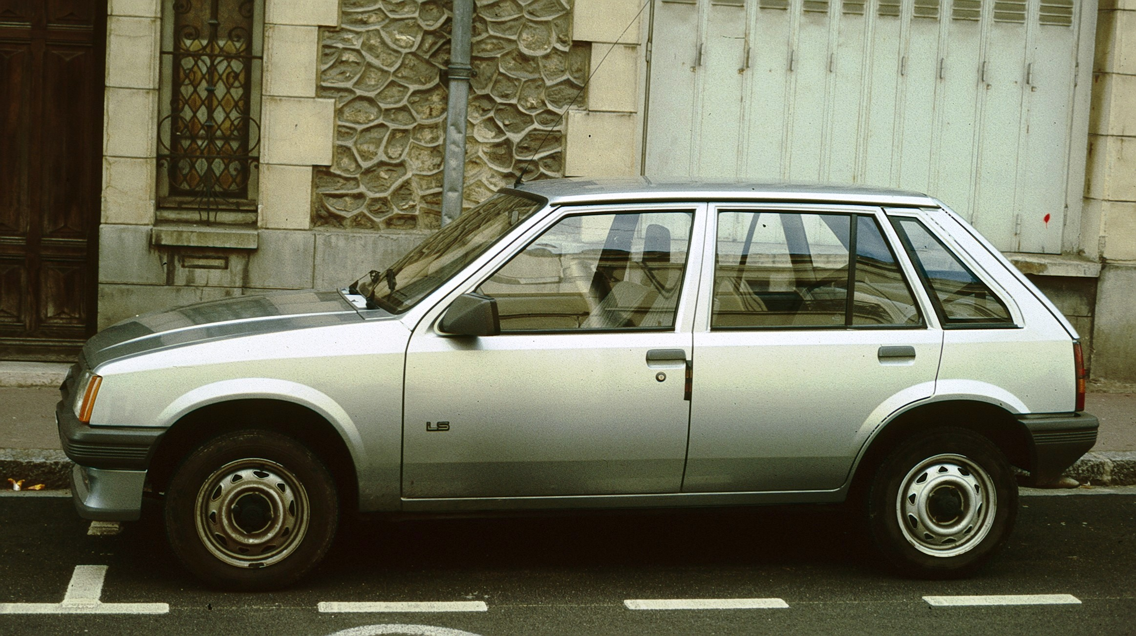 Opel Corsa 5 door hatchback